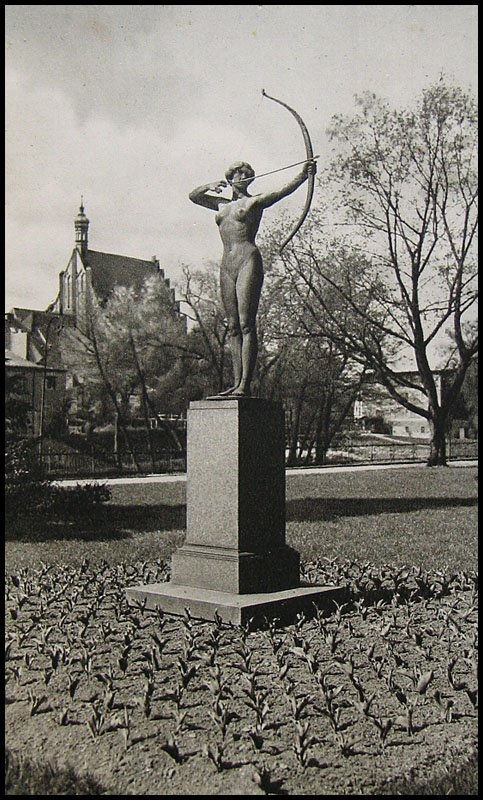 Pomnik Łuczniczki na Placu Teatralnym w Bydgoszczy